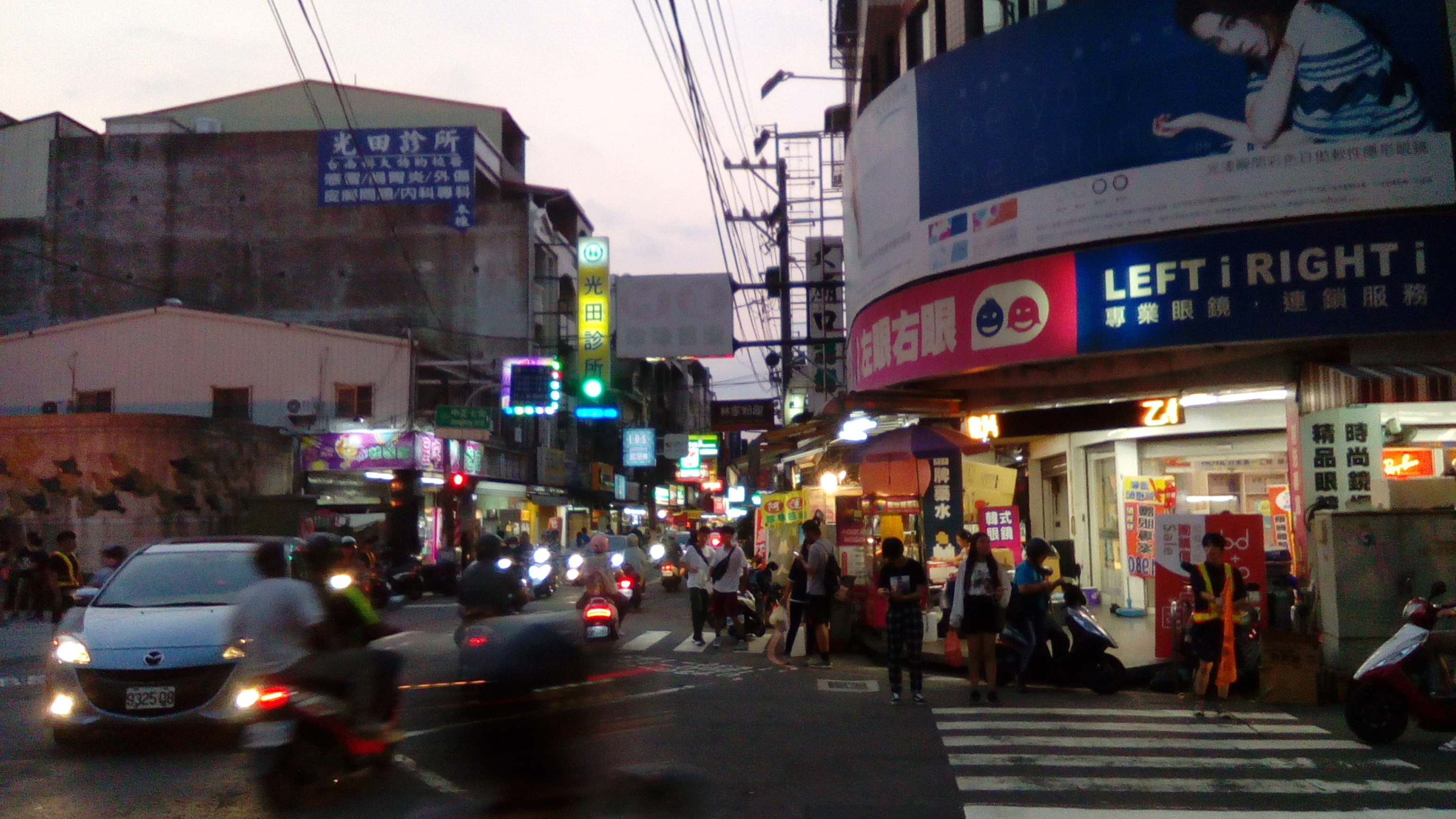 鹽行里中正路一帶